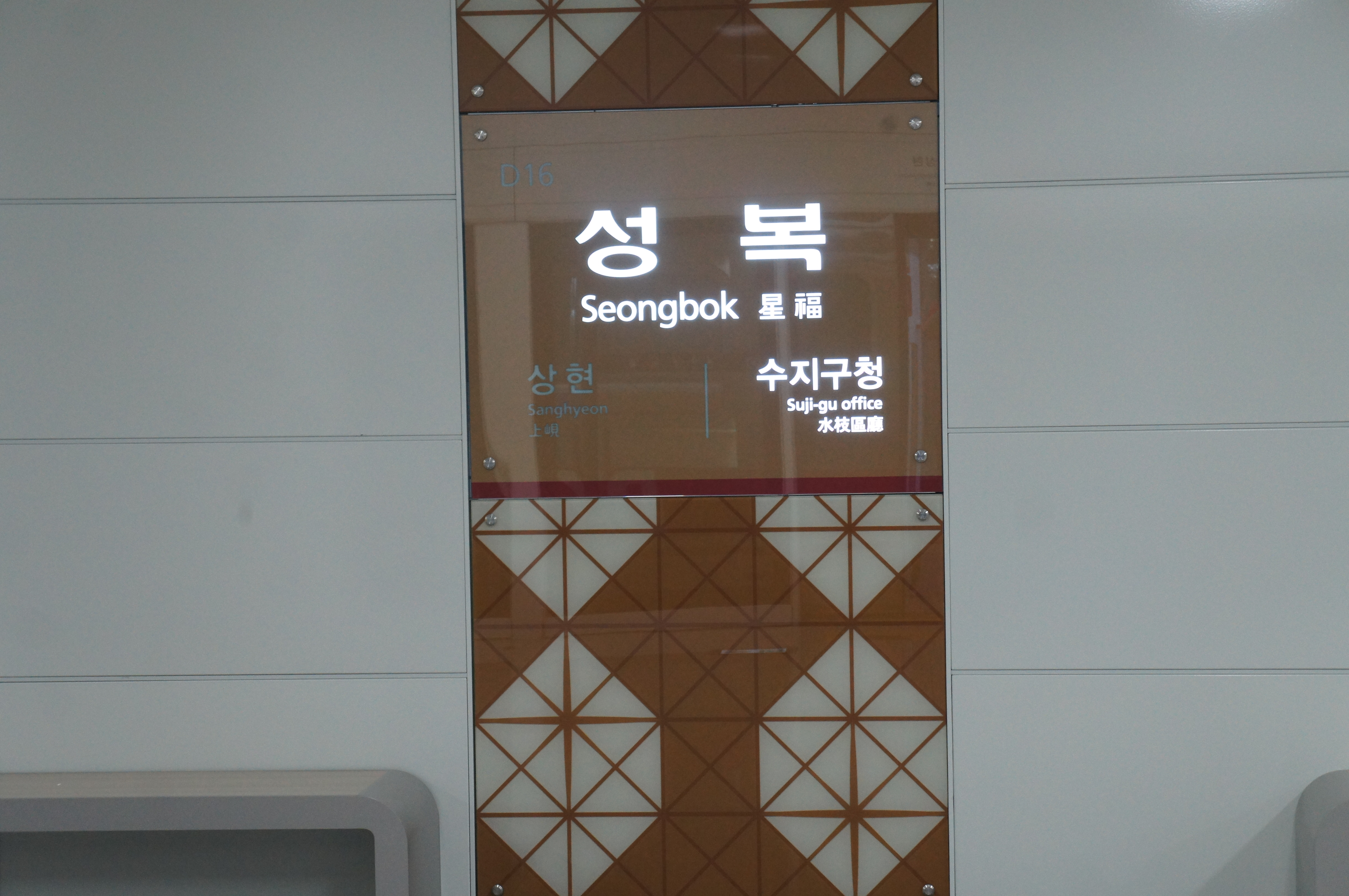 성복역 역명판